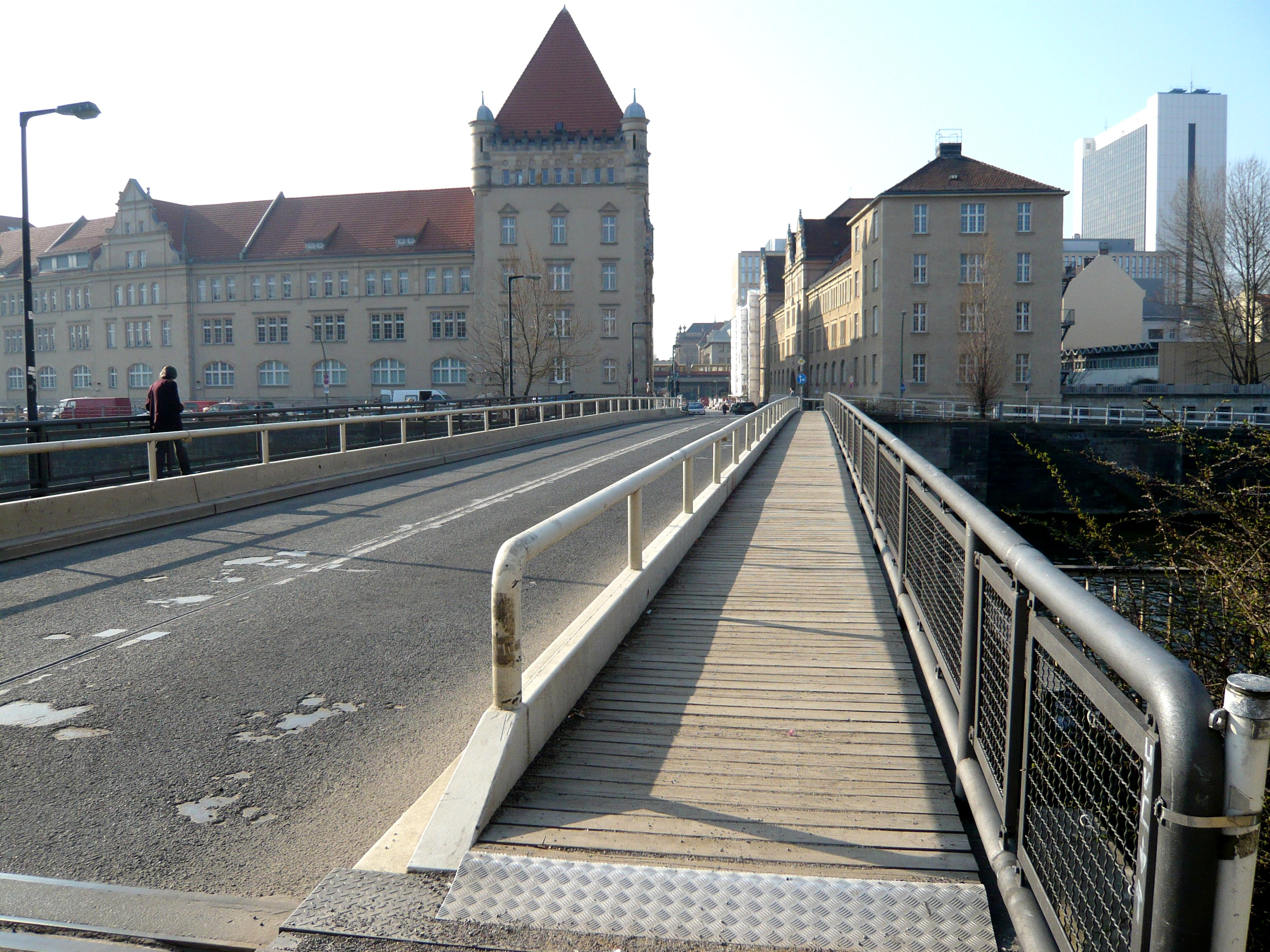 Nördliche Monbijoubrücke in Berlin-Mitte (1)